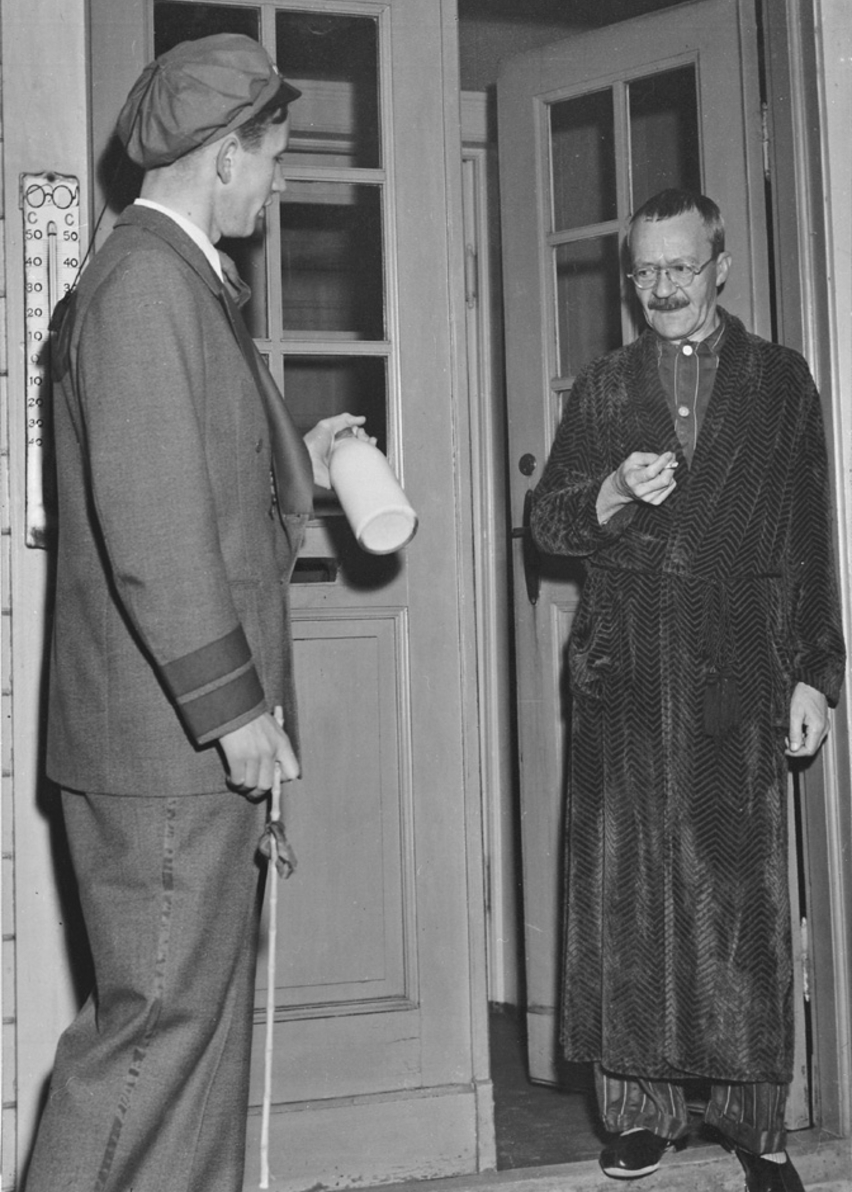 Russepresident Thorvald Stoltenberg vekker Arnulf Øverland 17. mai 1950. Fra Byhistorisk samling hos Oslo Museum.